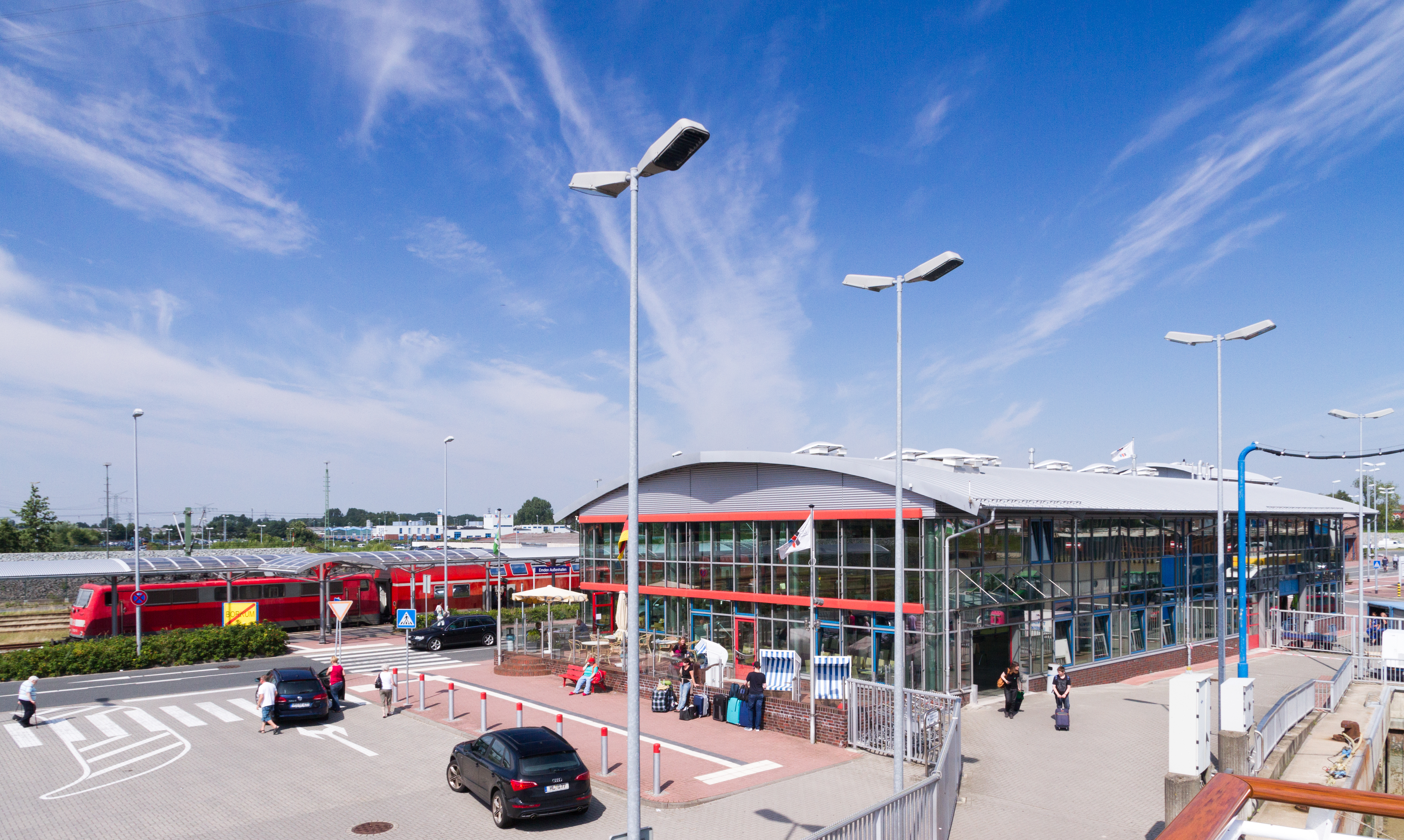 Emden Außenhafen